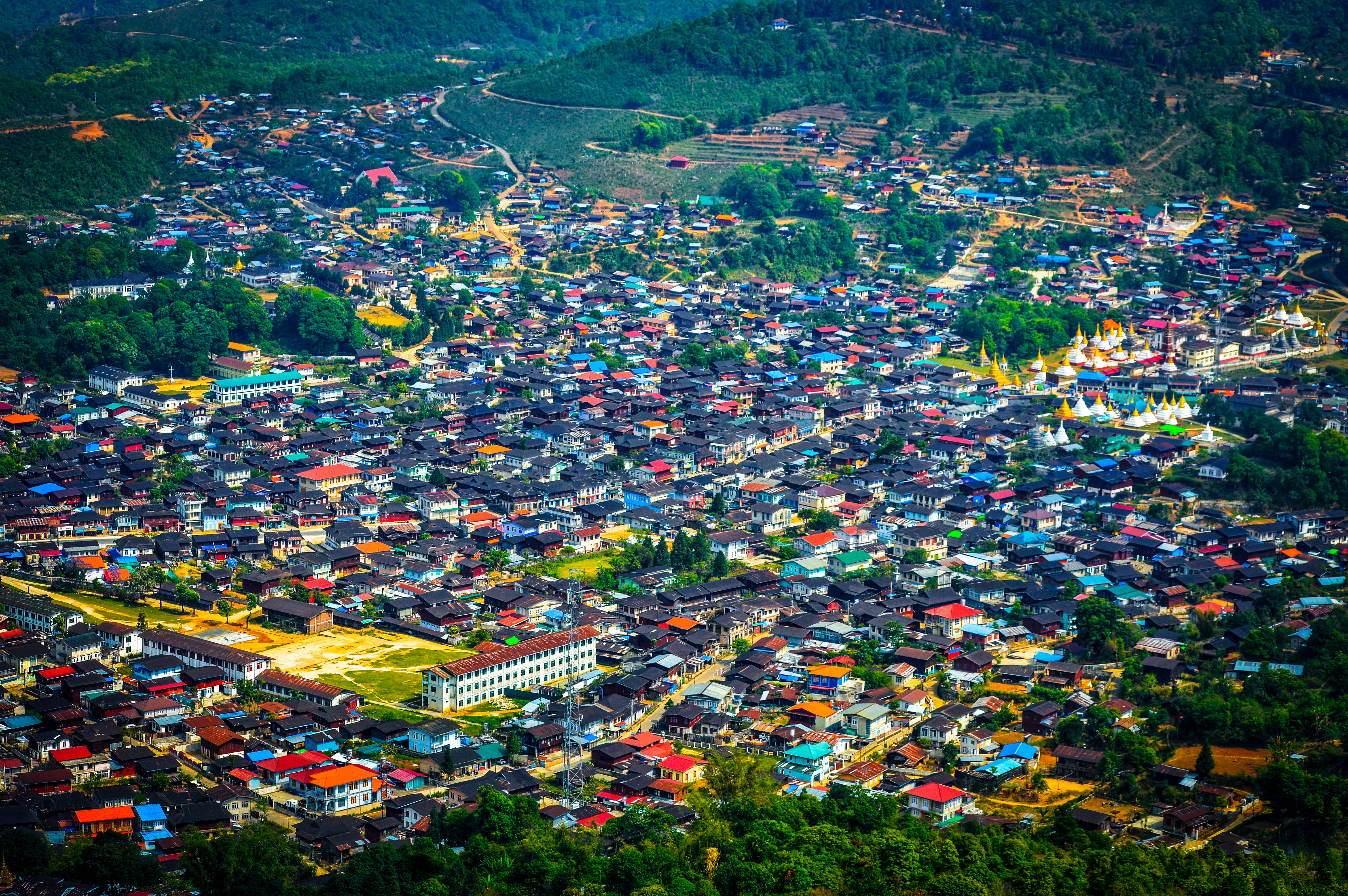 မြန်မာဘာသာ: လူချွန်လူကောင်းတို့ မွေးထုတ်ပေးရာ ကျပ်ပြင်အထက